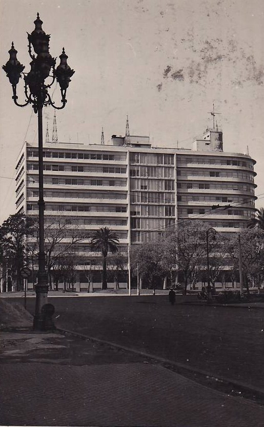 Vista del actual Edificio Guardacostas (sede de la Prefectura Argentina) en épocas en que alojaba al Ministerio de Marina. Desde la Plaza del Correo, postal enviada en 1957.